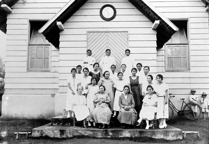 Repronegatief. Vergadering van de P.I.K.A.T. (Pertjintaan Iboe Kepada Anak Toeroen-toemoeroen), een vrouwen-vereniging uit Manado. Hier de afdeling Mongondow, Bolaangmongondow, Noord-Celebes